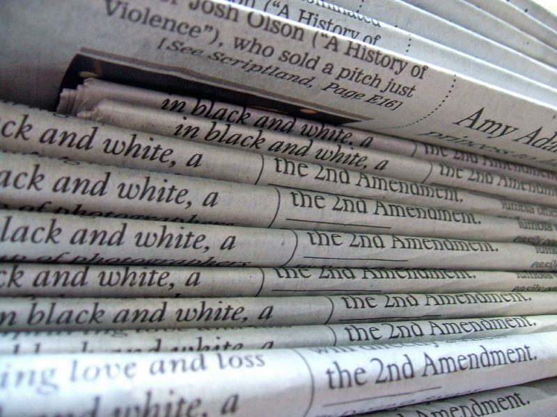 LA Times